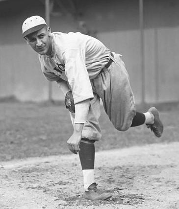 Ernie Koob